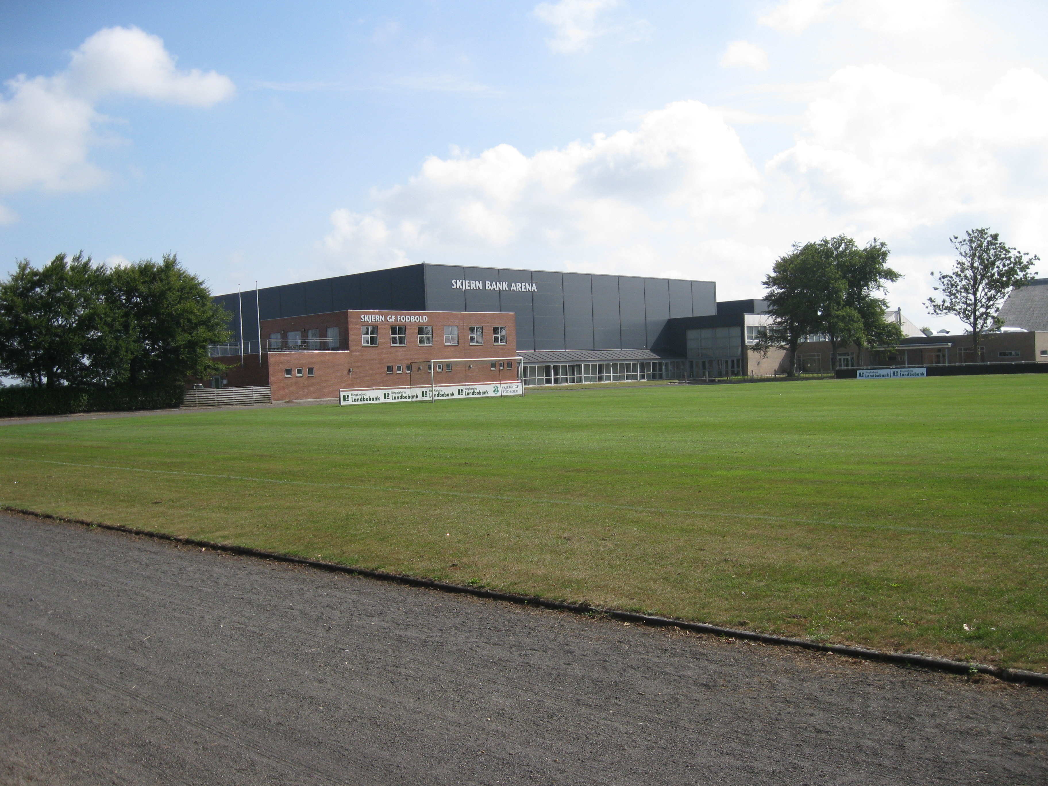 Skjern Bank Arena, Skjern